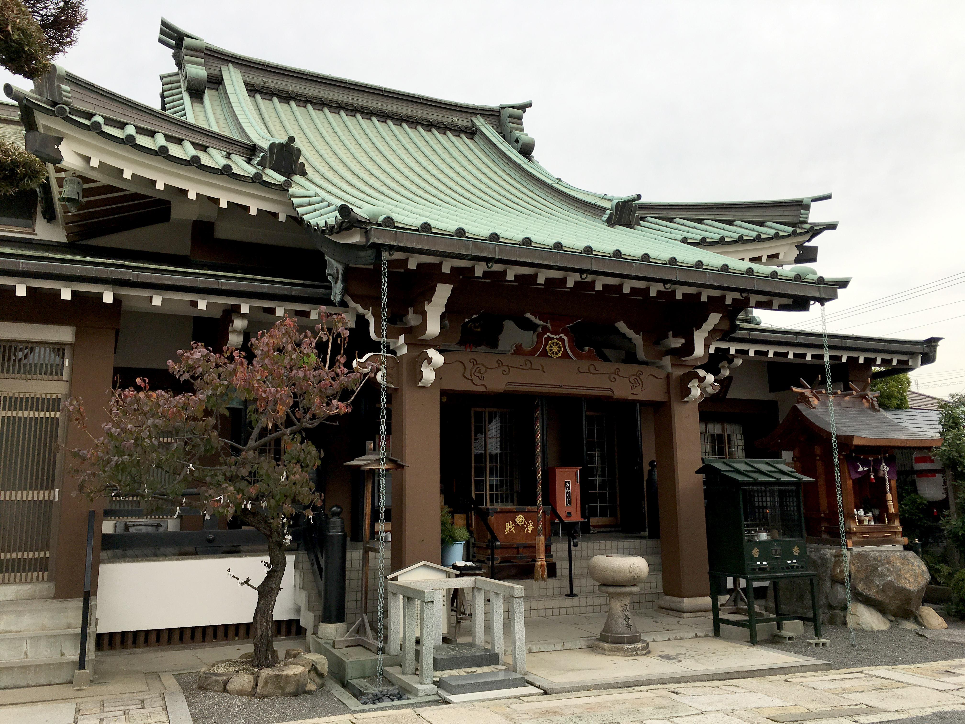 京善寺 本堂